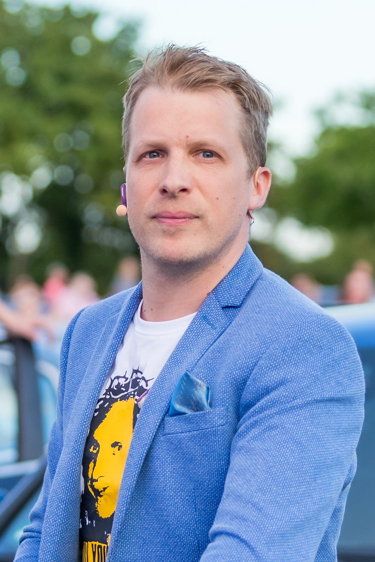 Die Pochers hier! during CARStival at Maimarktgelände, Mannheim, Baden-Württemberg, Germany on 2020-07-05, Photo: Sven Mandel Promotion: go7.ag